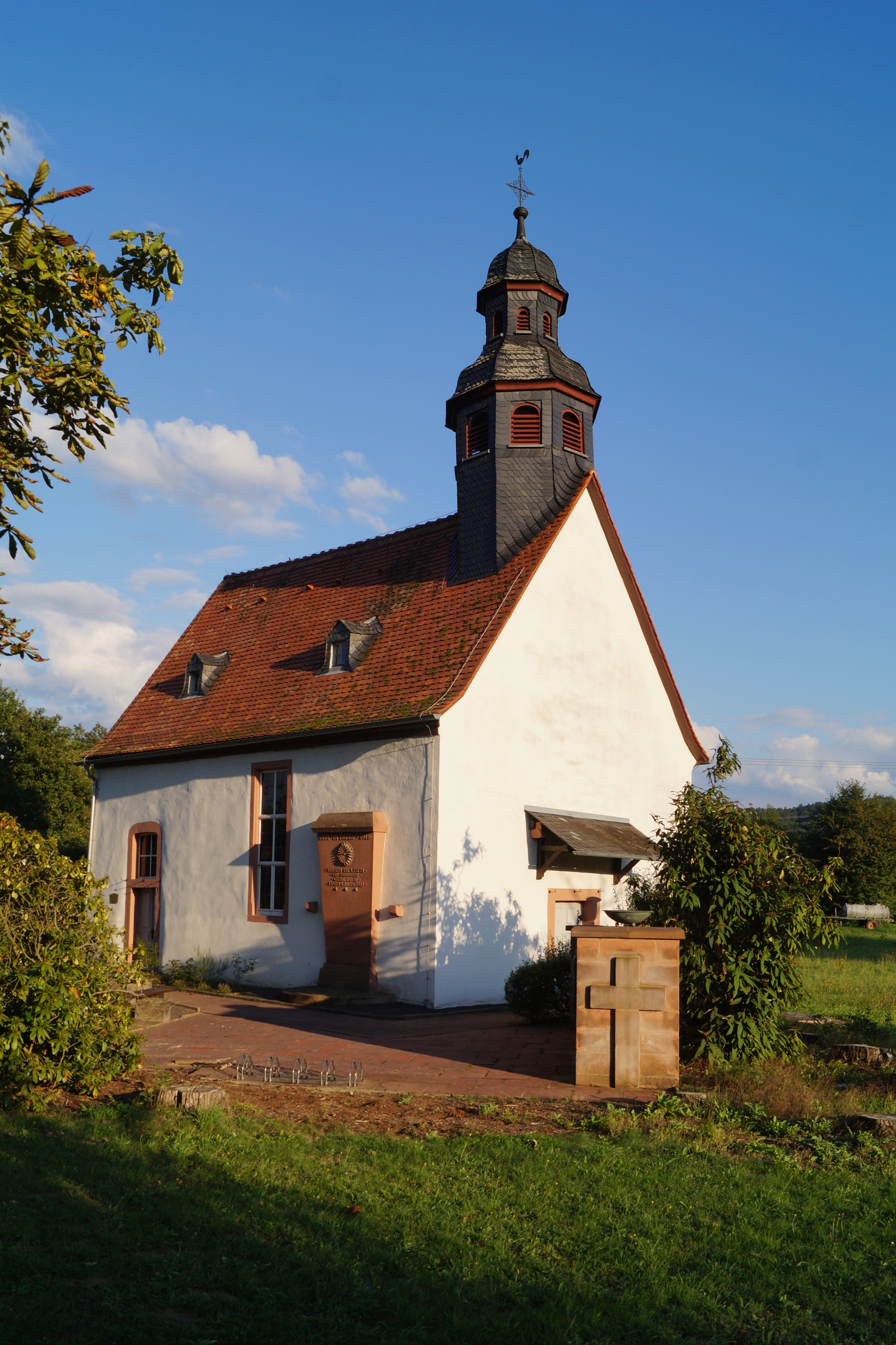 St. Laurentius in Hain-Gründau, Gemeinde Gründau, Ansicht von Nordosten.